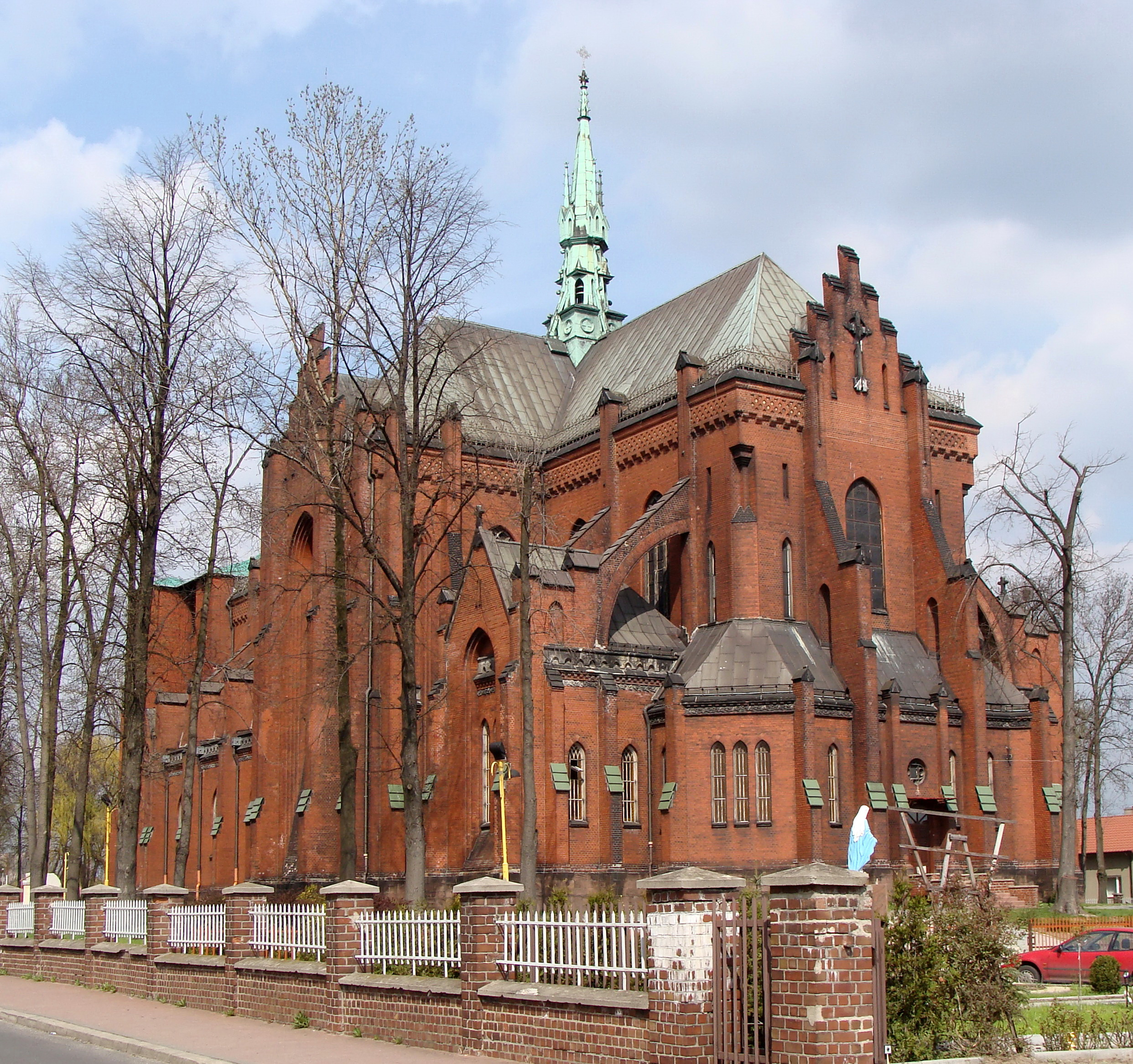 Dąbrowa Górnicza - Strzemieszyce Wielkie - Kościół p.w. Najświętszego Serca Pana Jezusa